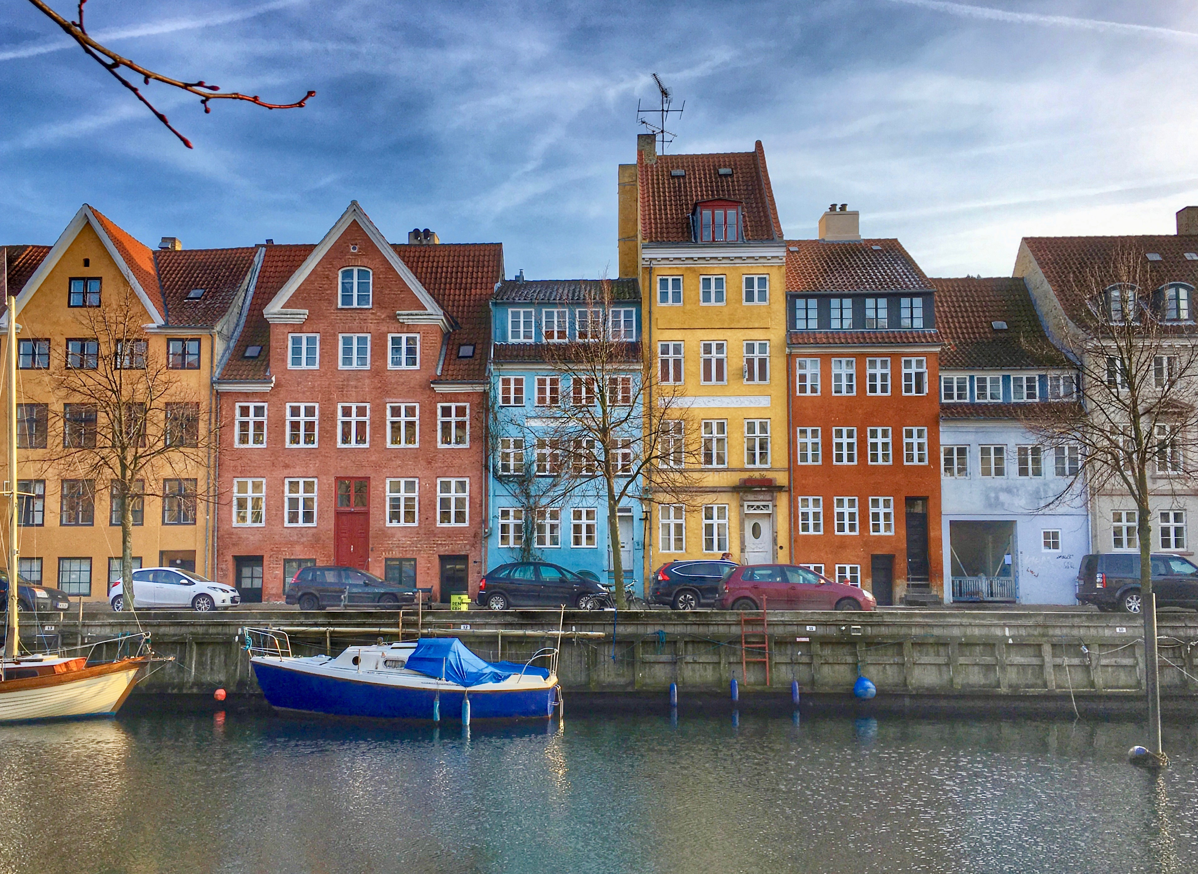 Overgaden oven Vandet set fra Overgaden neden Vandet, Christianshavn